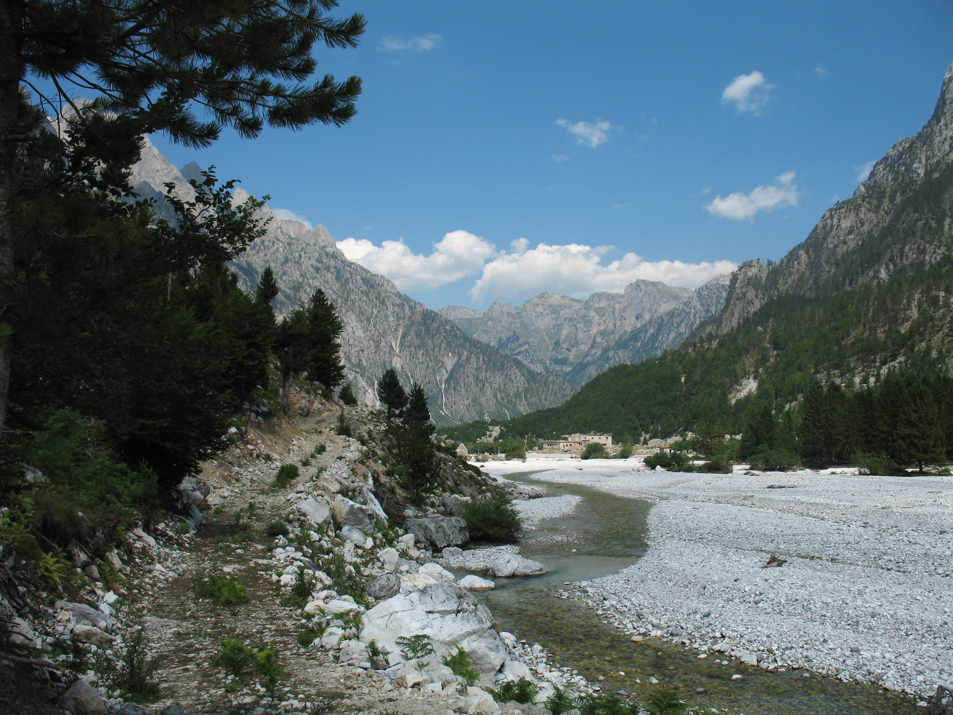 Valbona Valley, Albania, 2012